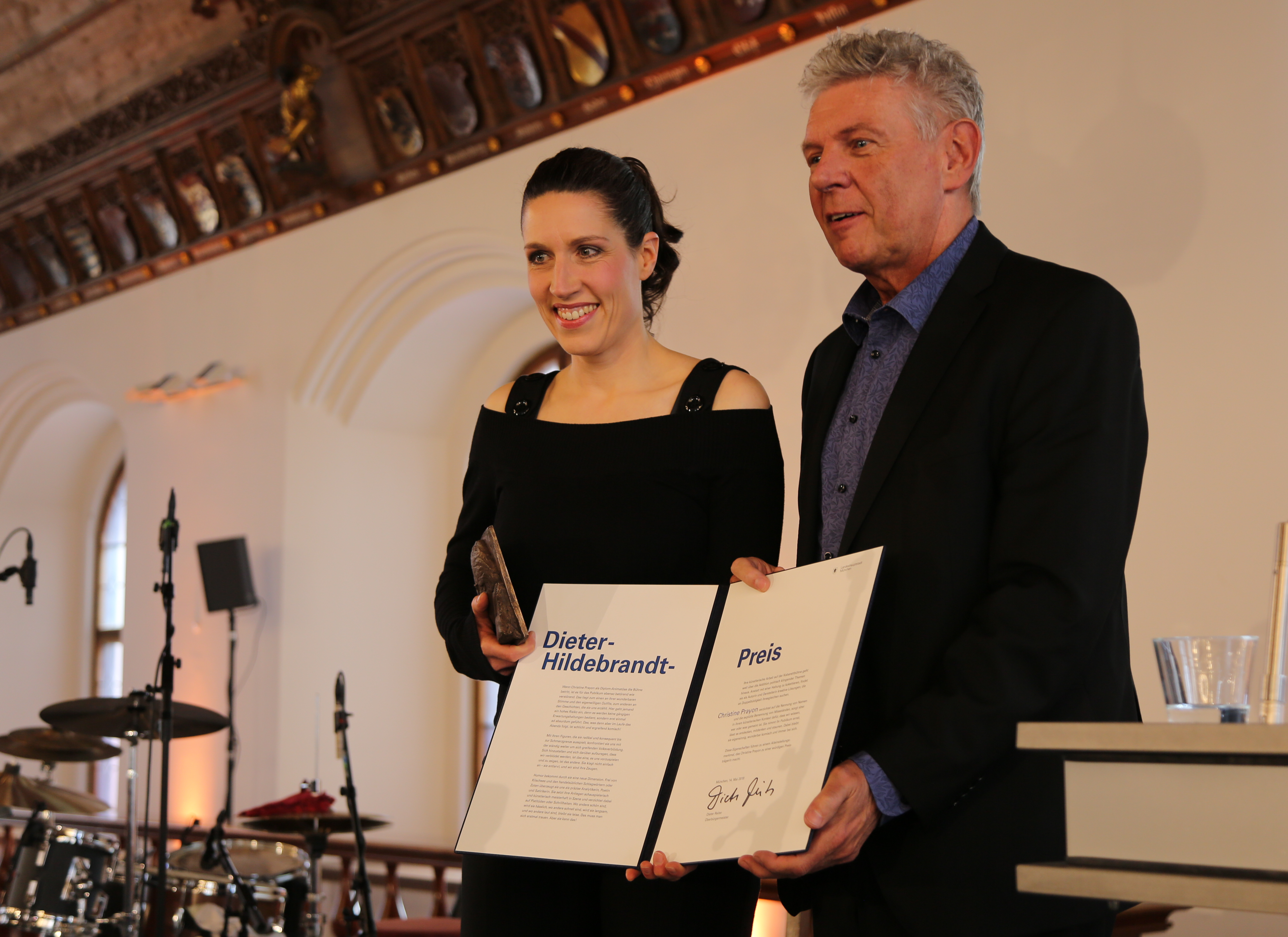 Verleihung des Dieter-Hildebrandt-Preises 2019 an Christine Prayon im Alten Rathaus. München